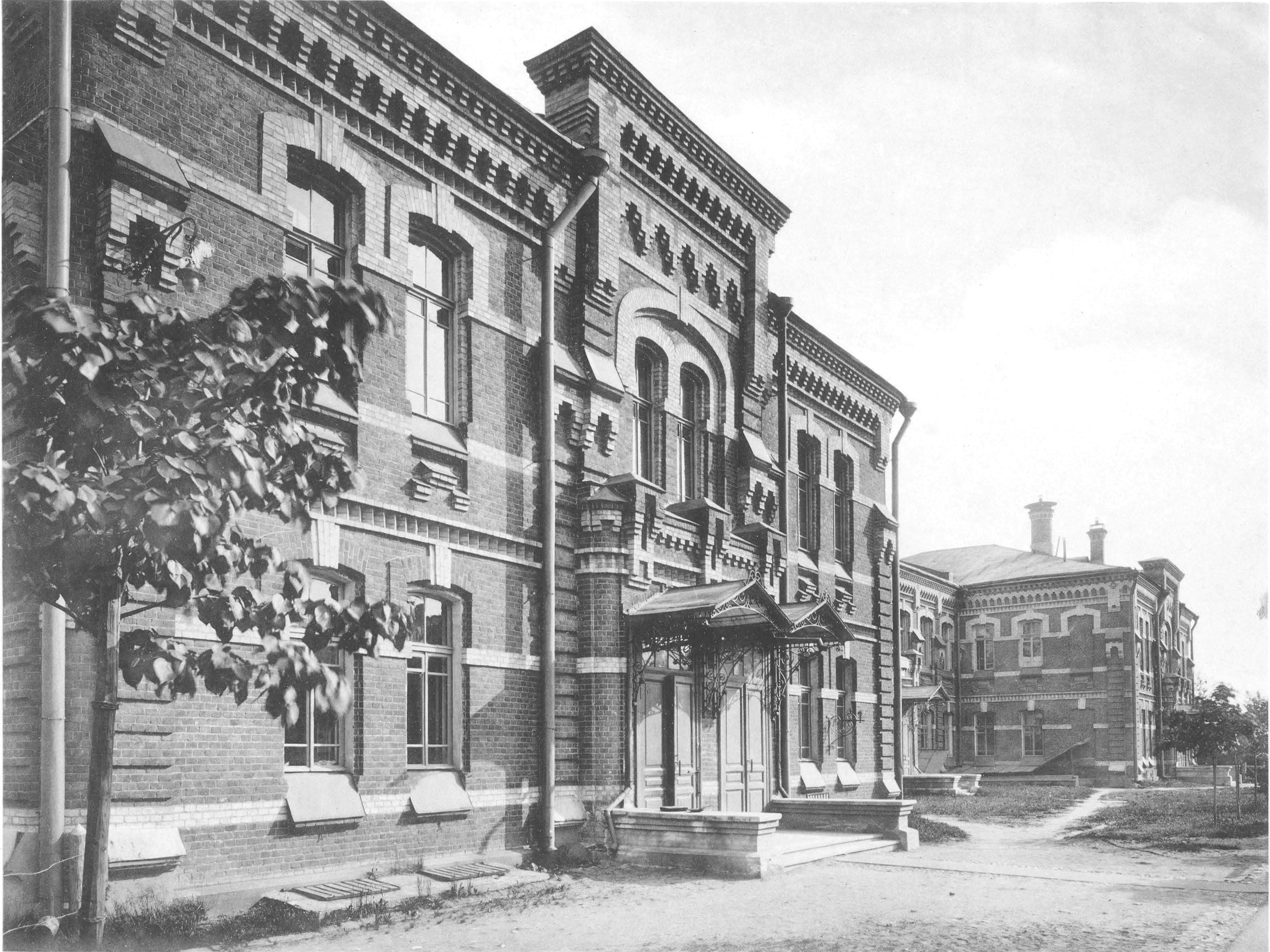 69. Сокольническая больница. Скарлатинный корпусъ. (Москва)